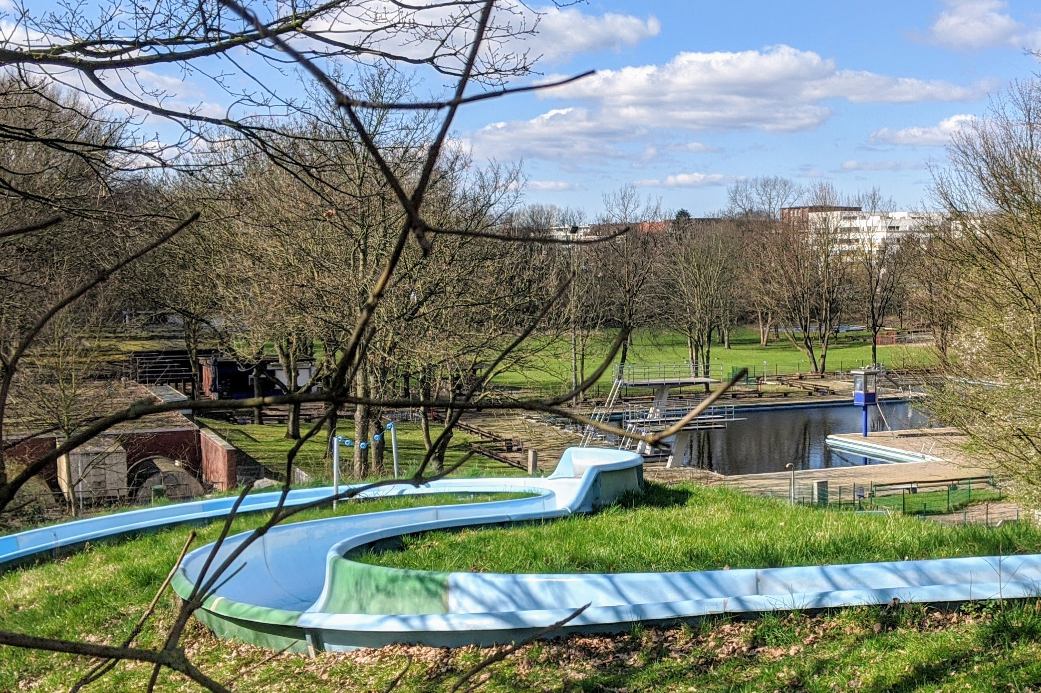 Freibad Aschberg in Hamburg-Hamm, Blick von der Wasserrutsche zum Schwimmbecken